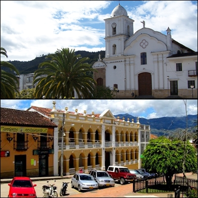 Portada Del Municipio de Guateque